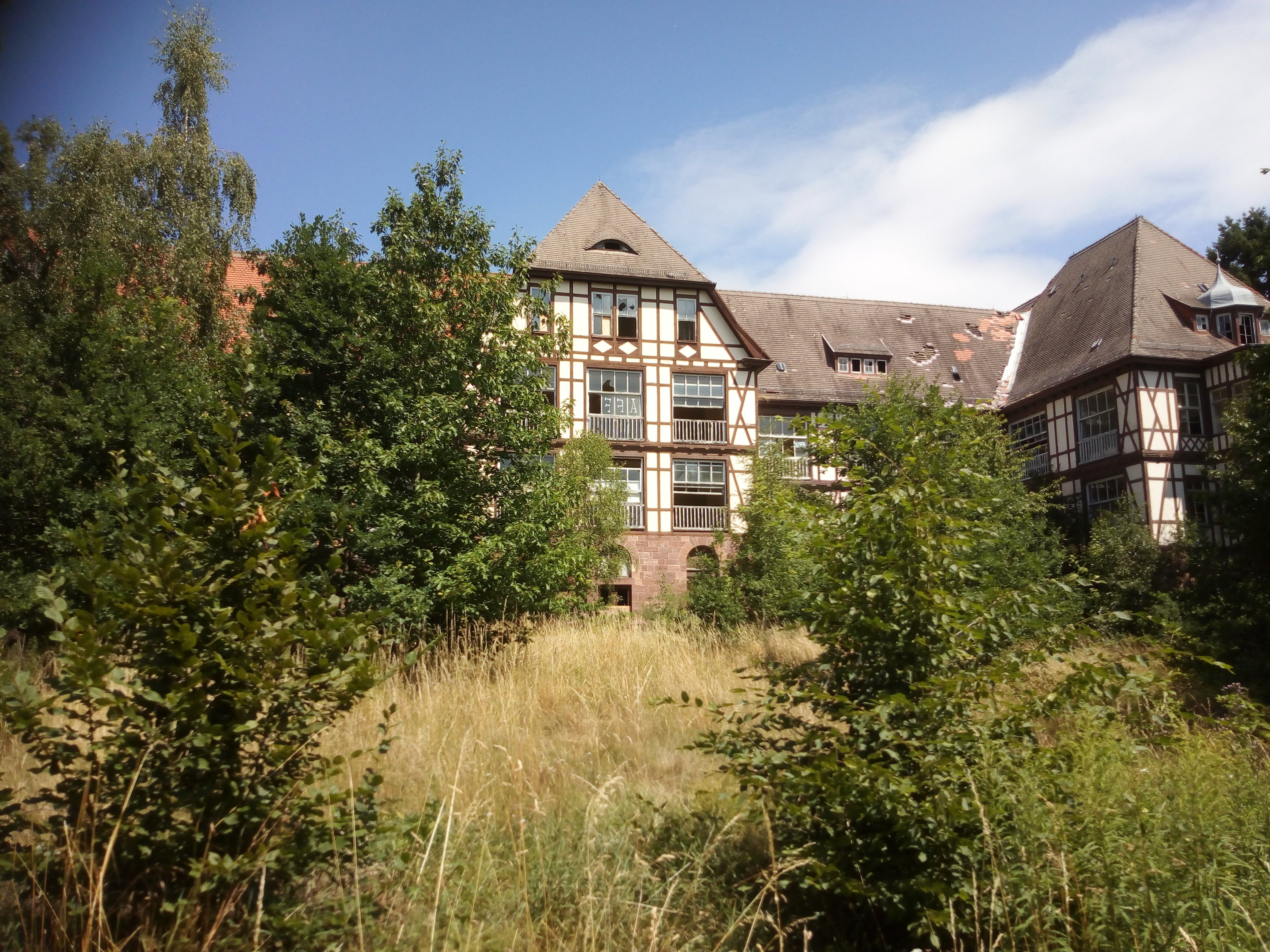 Sophienheilstätte Bad Berka-München